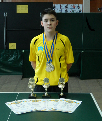 Кандидат у майстри спорту України Антон Лімонов